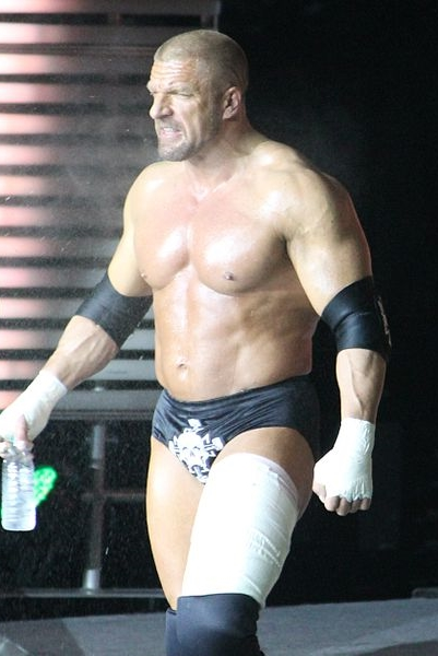 Imagen recortada de la imagen The Authority in April 2014.jpg